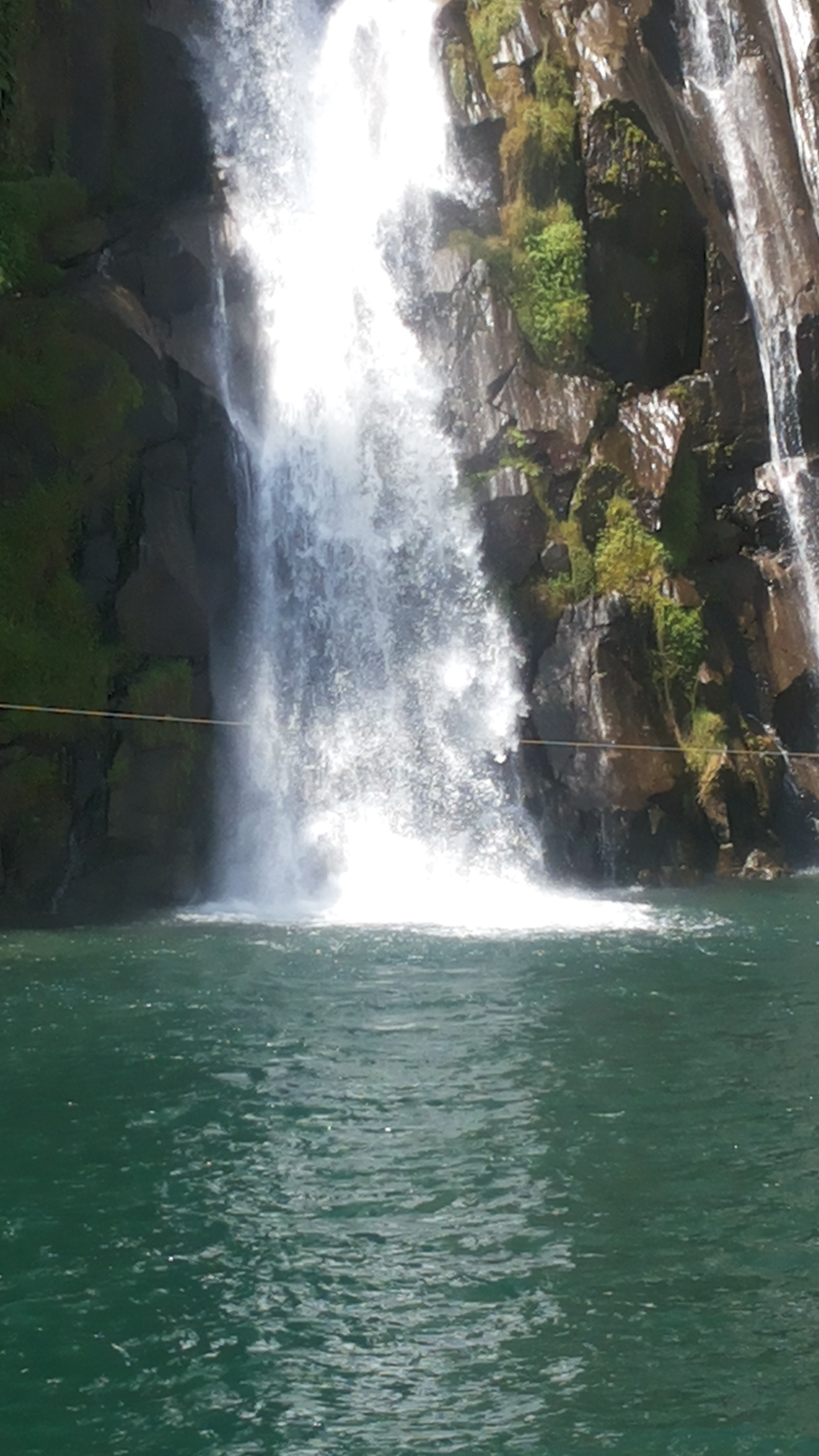 Air Terjun Situmurun (Binanggalom) ini bisa juga disebut sebagai air terjun Binanggalom karena airnya berasal dari sesa Binanggalom, Toba samosir. kata Binanggalom berasal dari nama sebuah sungai yaitu Lum (Lom) dalam bahasa batak toba dikatakan sebagai air penyejuk hati. air terjun ini tergolong unik karena airnya mengalir langsung jatuh ke Danau Toba. untuk menuju lokasi air terjun ini kita bisa ke pelabuhan ajibata menuju air terjun menaiki kapal wisata atau kapal motor yang langsung menuju ke tempat tersebut.